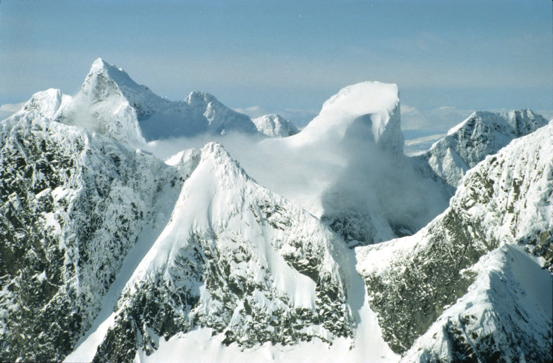 Hurrungane, April 1990. Store Austanbotntind (til venstre), Store Ringstind og Soleitindane. Foran til venstre Nordre Midtmaradalstind, Berges skard, Søre Dyrehaugstind. Bildet er tatt fra Storen. Foto: Tore Røraas / Marianne Gjørv.